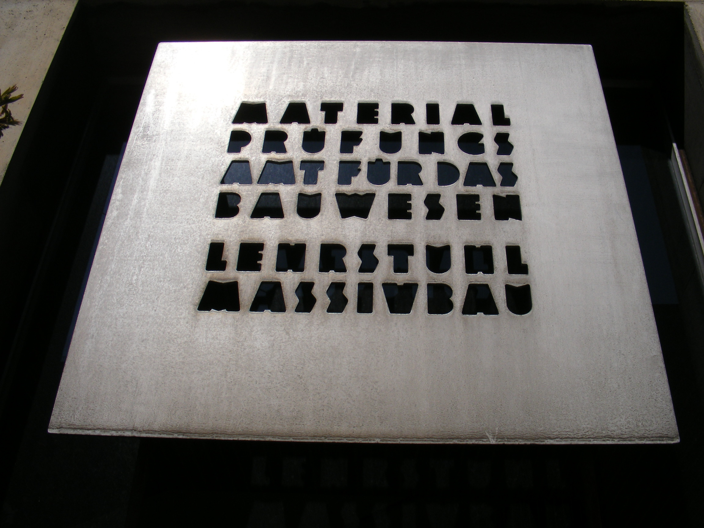 Schriftzug "Materialprüfungsamt für das Bauwesen der Technischen Universität München — Lehrstuhl Massivbau" [1]